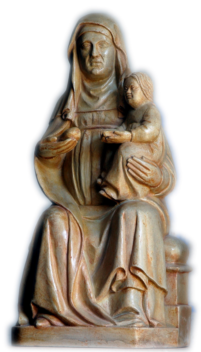 Imatge de Santa Anna de Montornès (còpia de Joaquim Camps)